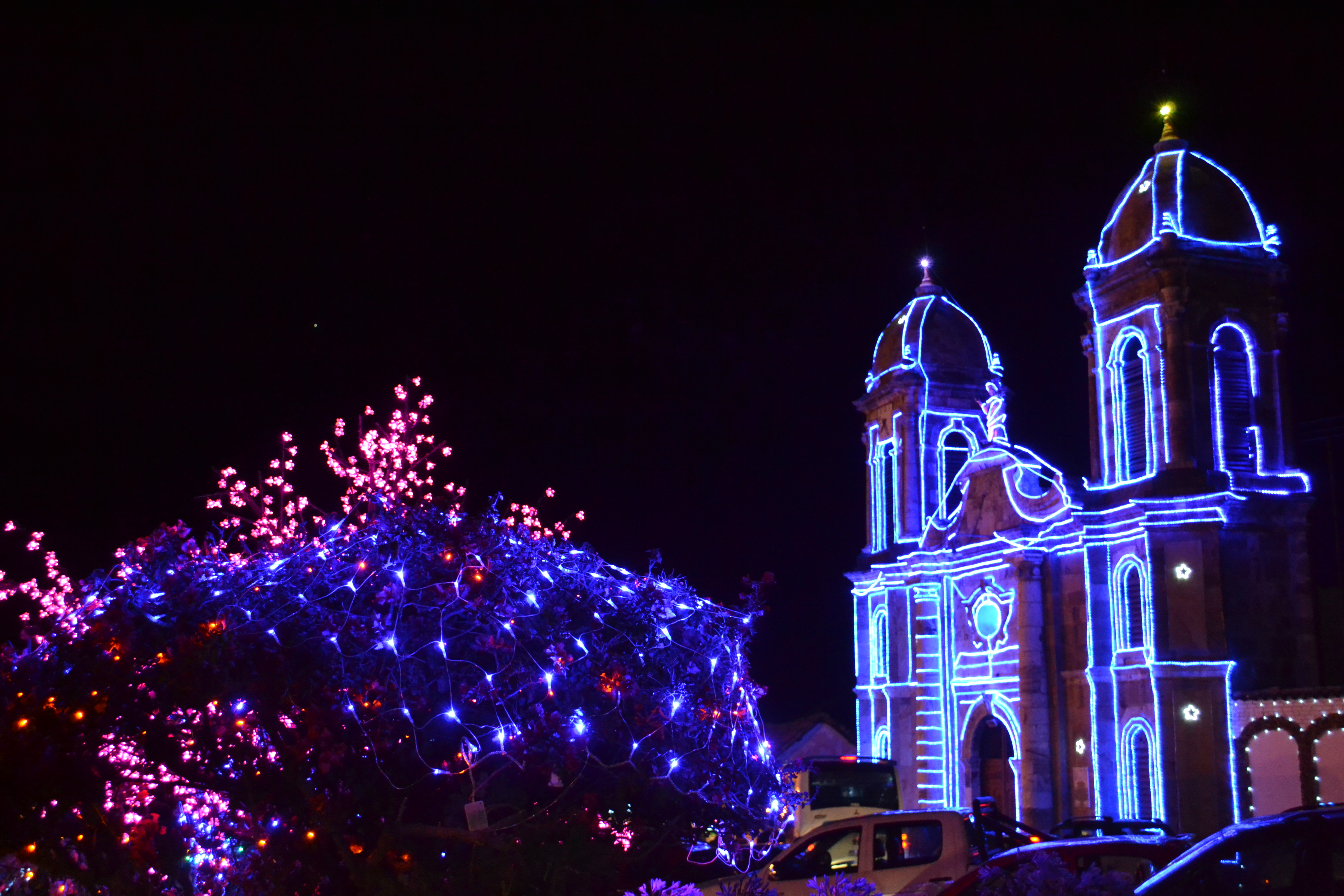 Iglesia Nuestra Señora del Rosario